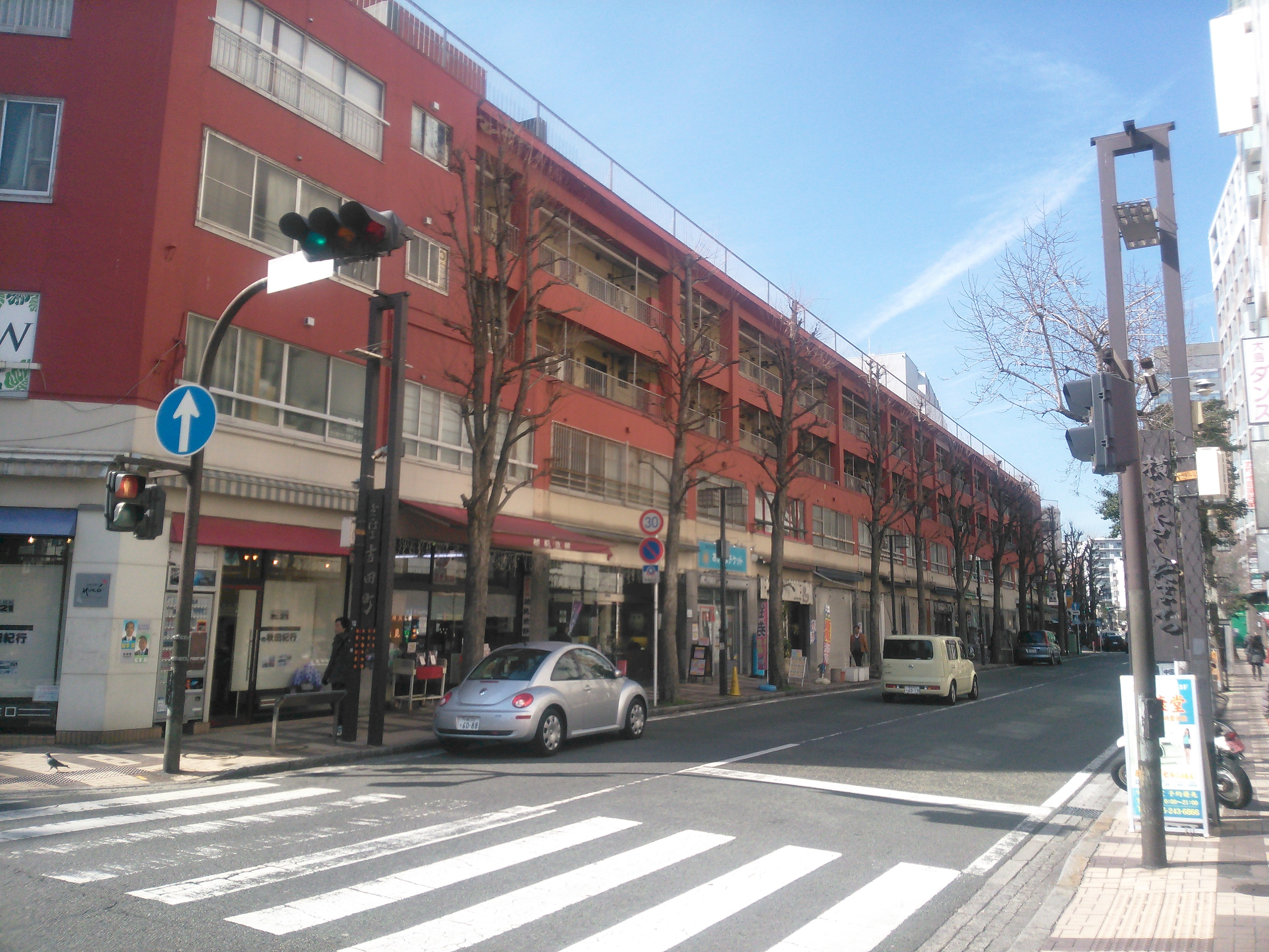 横浜市中区、吉田町